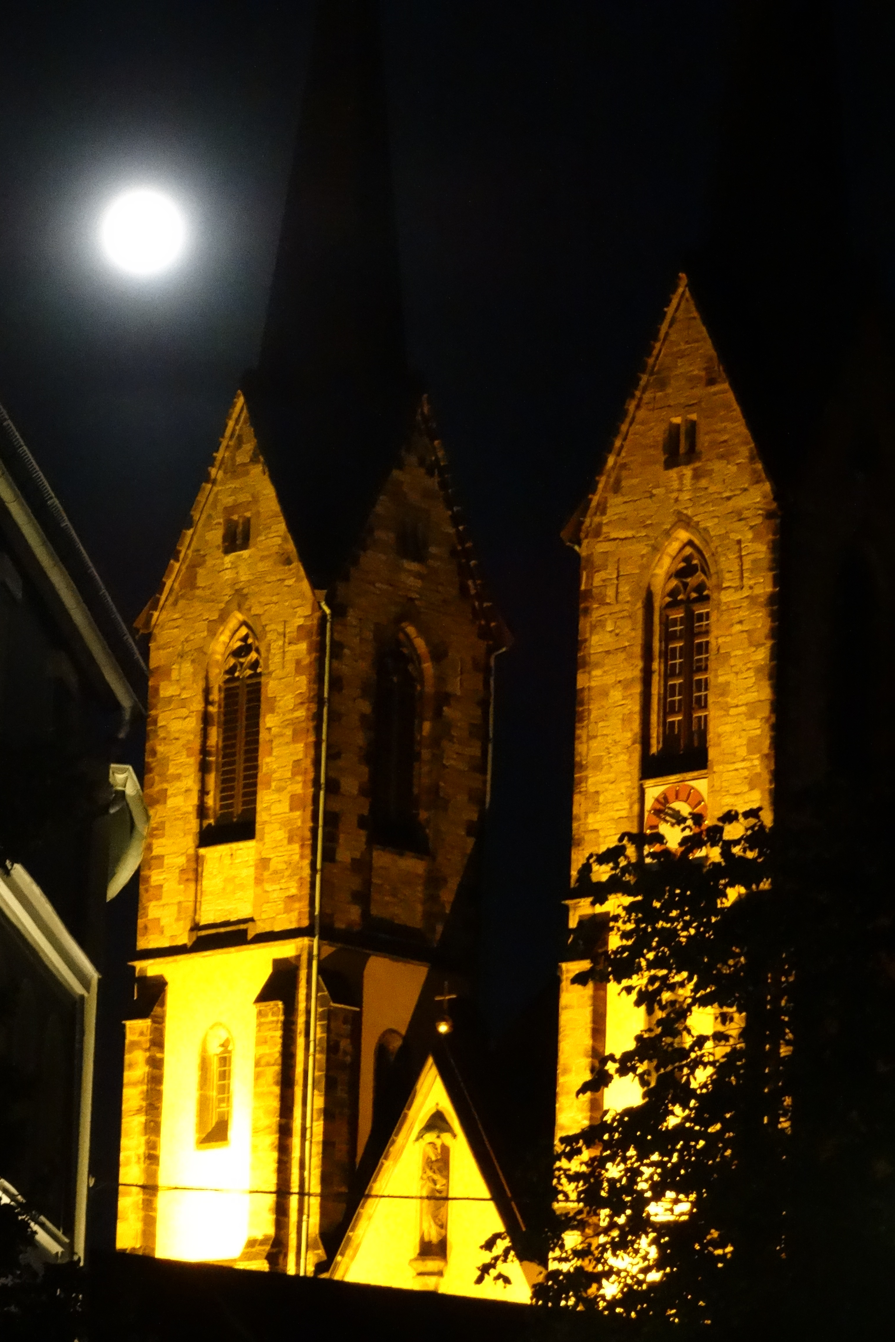 Stadtpfarrkirche St. Marien Hof